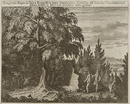 Titel i svensk övers. : Konung Rings gravsten i Ringåsens skog, en halv mil från Komstads kyrka i Kinne härad i Västergötland.